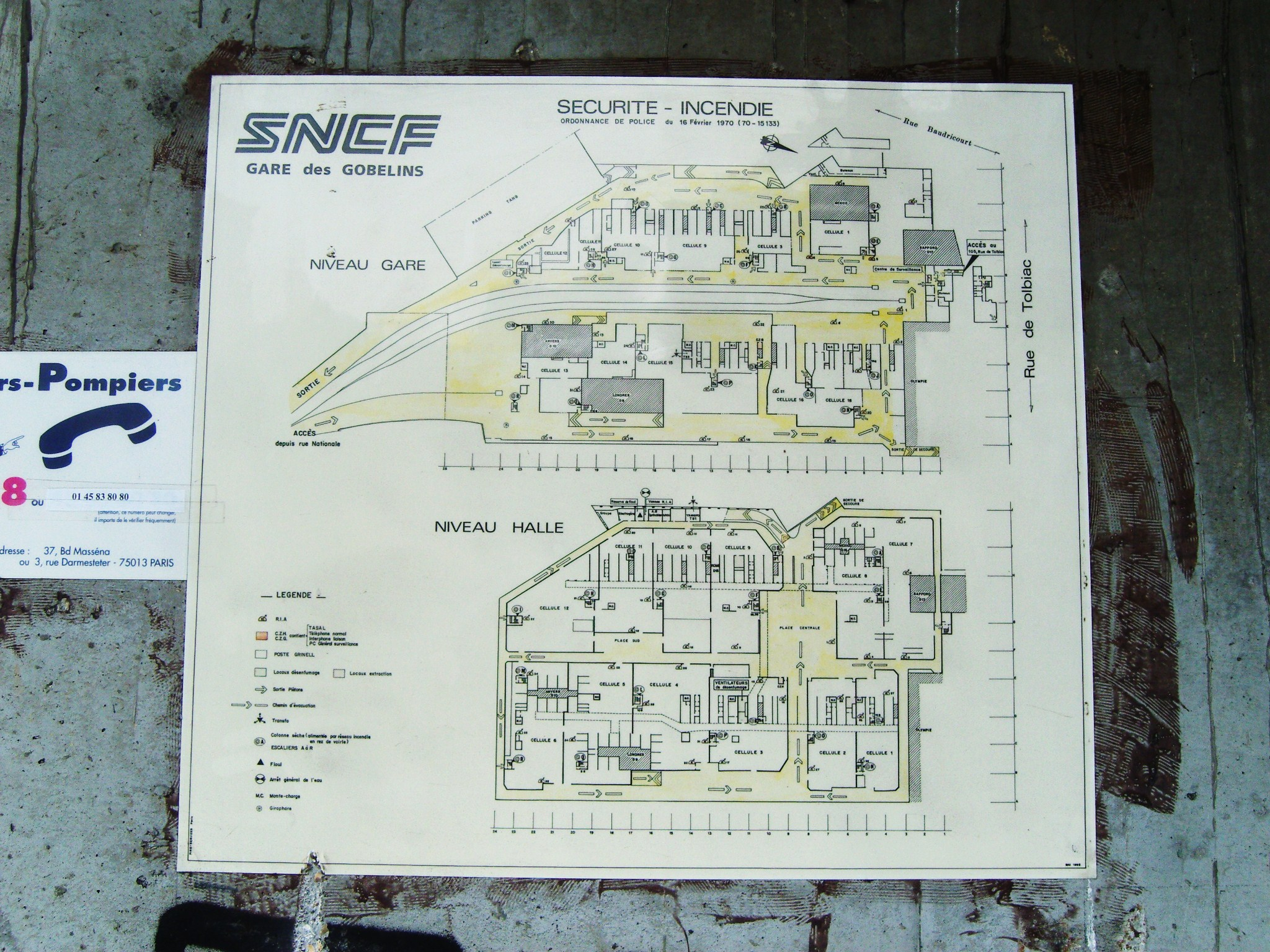 Paris 13e arrondissement, entrepôts de Paris-Gobelins, plan